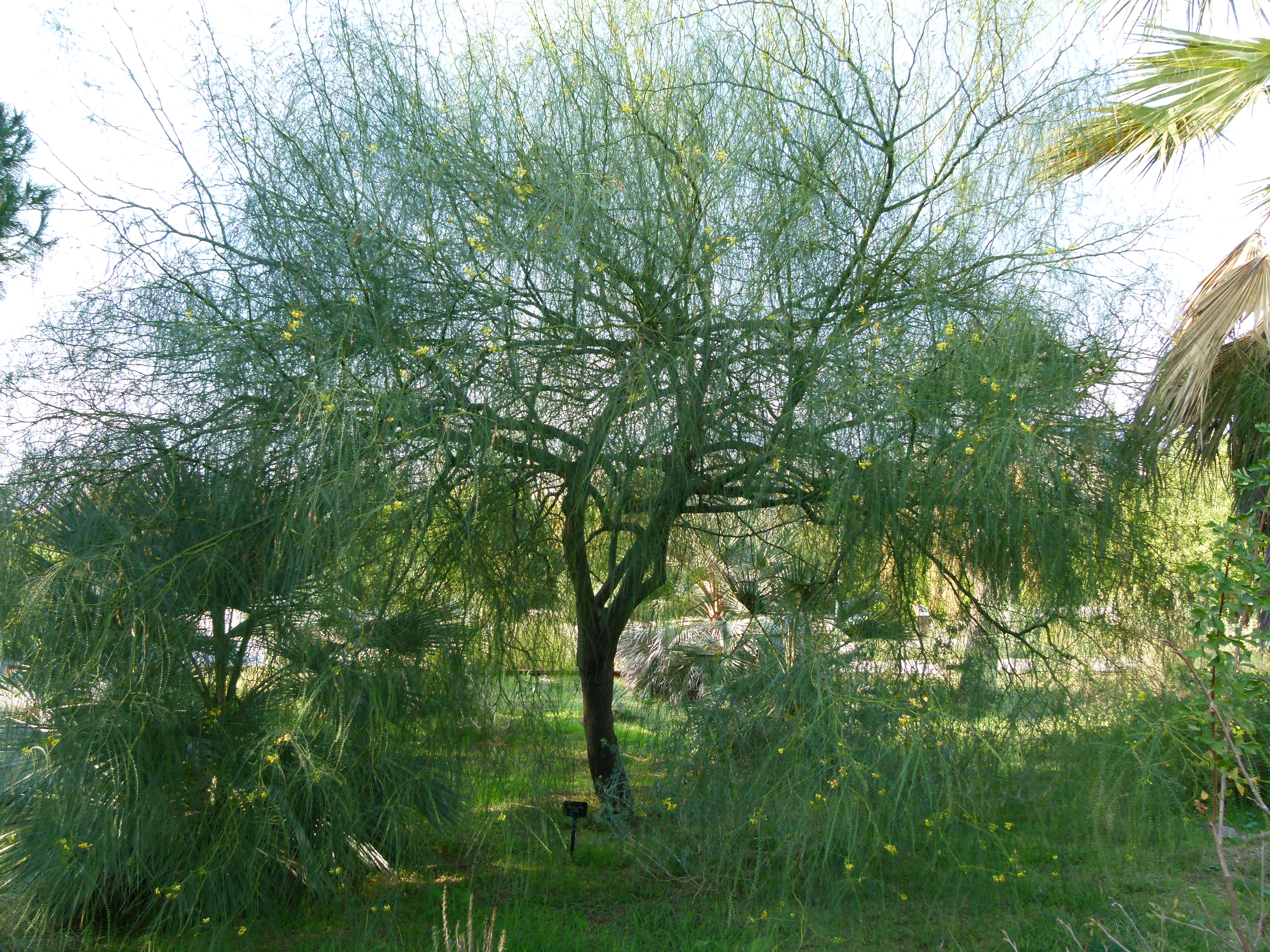 Jardin botanique Barcelone